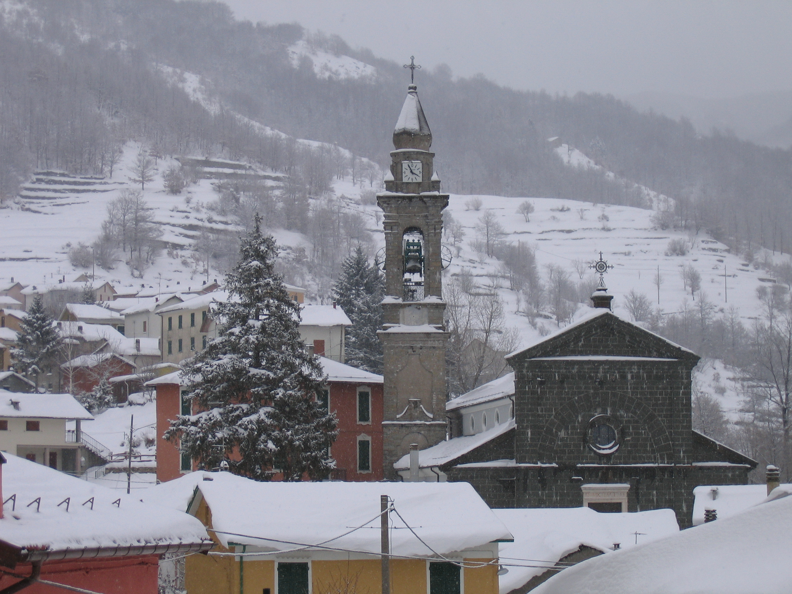 Foto: Alpicella d'Aveto sotto la neve Autore: Franco Luigi Mazza Proprietà: Franco Luigi Mazza